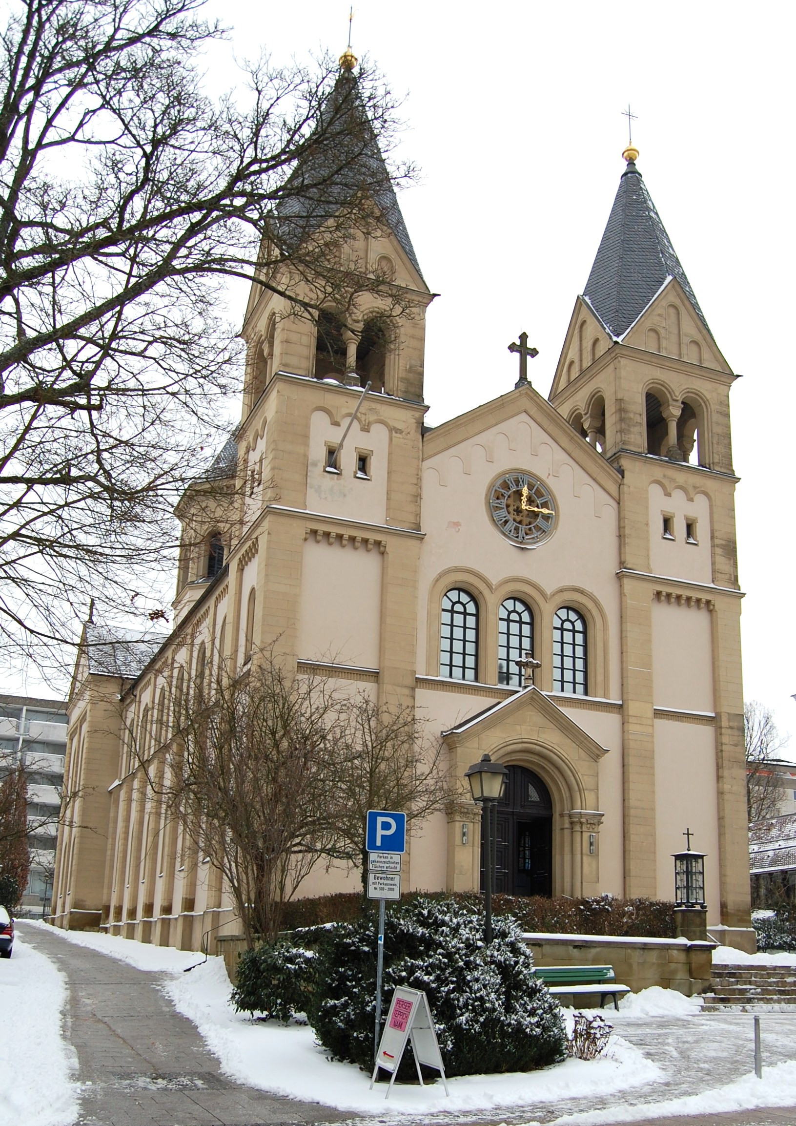 Protestantische Erlöserkirche in Bad Kissingen, Vorderansicht